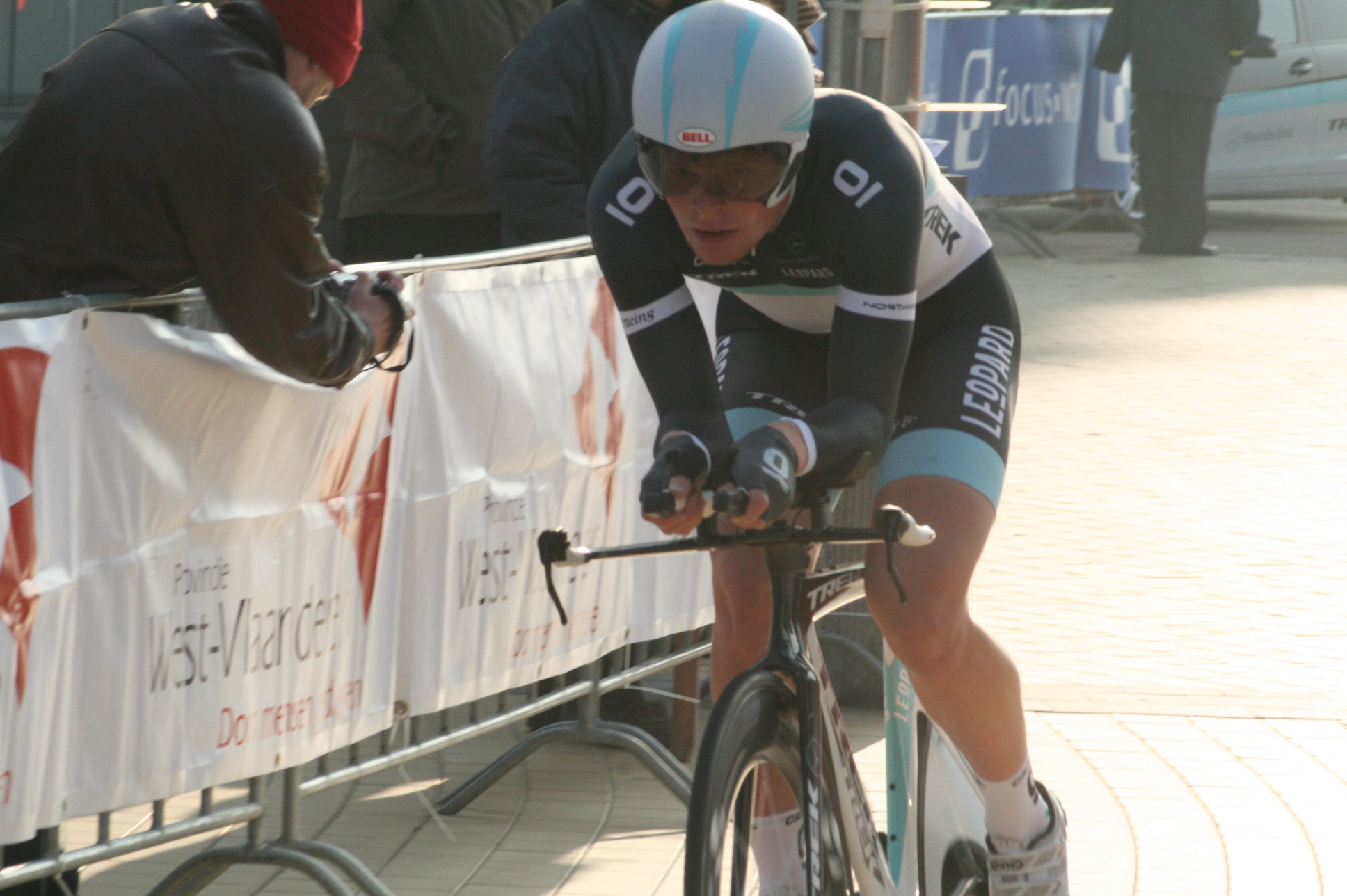 Driedaagse van West-Vlaanderen 2011, proloog in Middelkerke